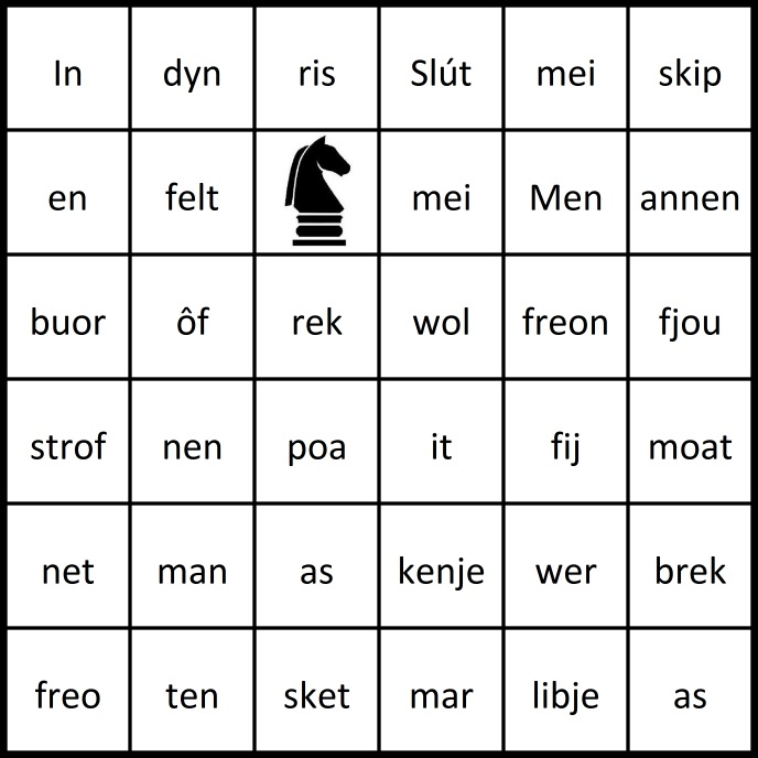 Friestalige paardensprongpuzzel